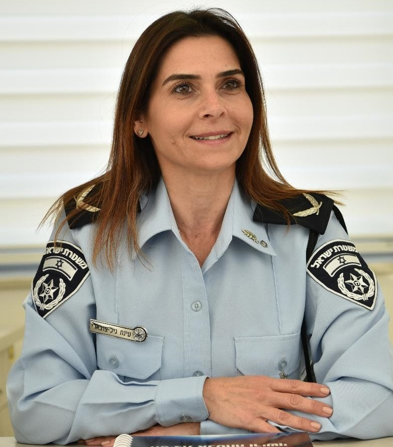 תת ניצב עינת גיל-צובארי